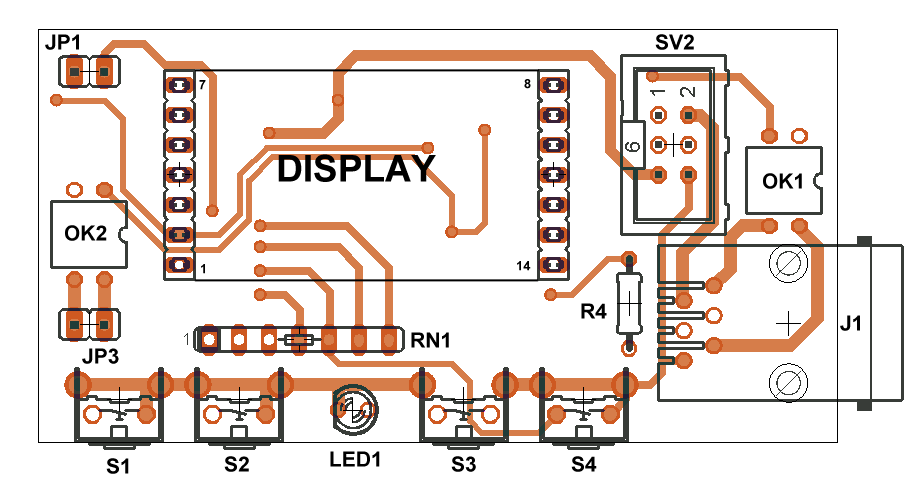 Plošný spoj - návrh plošného spoje